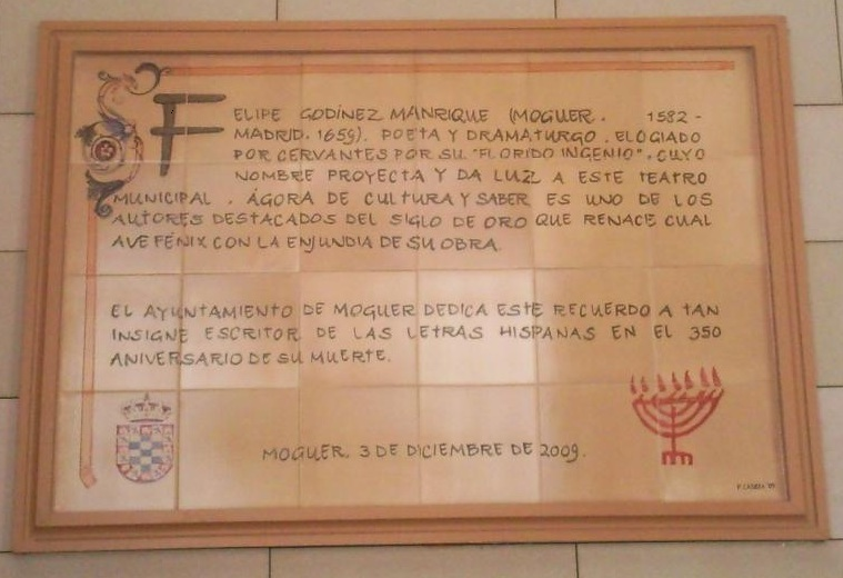 Placa homenaje a Felipe Godinez.